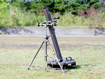 [口径]81mm [重量]約52.0kg [発射方式]固定銃針（落下発射） [砲架型]二脚架 [装填方式]砲口装填 [俯仰]40～85度 [製作]豊和工業 米国でM1の性能を向上させた、M29をもとに国産した。運用、性能的には大差はないとされているが、同砲の特徴としては、M1に比較して、全備重量を大幅に軽量化し、全周射界をもつなど機動性向上がはかられている。